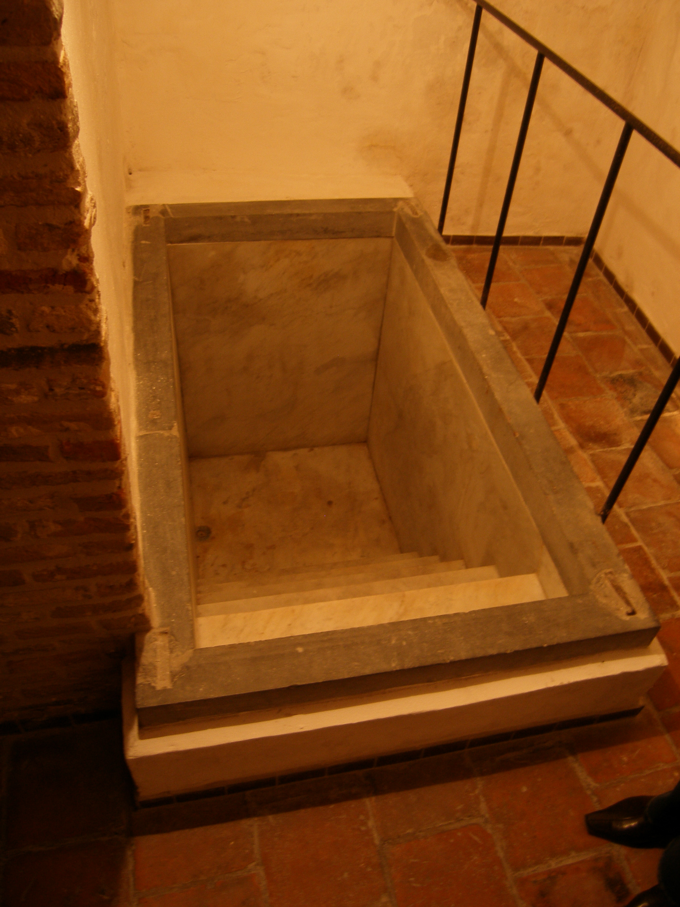 Ritual bath (mikve) in synagoge at Koevoetstraat 39, Bergen op Zoom